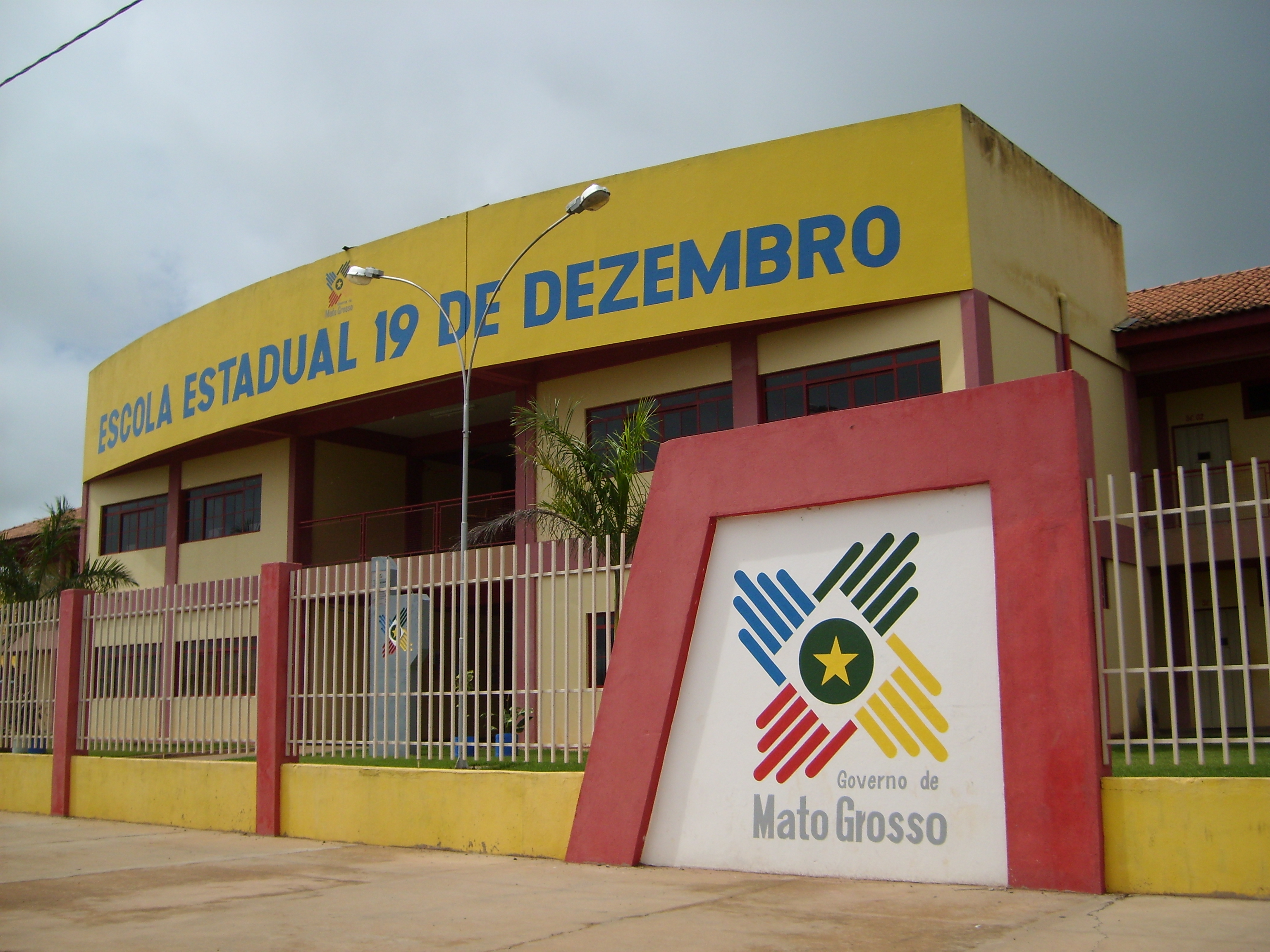 Fachada da Escola Estadual de Educação Básica 19 de Dezembro